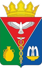 Герб Кировского района Республики Крым РФ. Утвержден Решением Кировского районного Совета от 26 октября 2016 г. № 415.